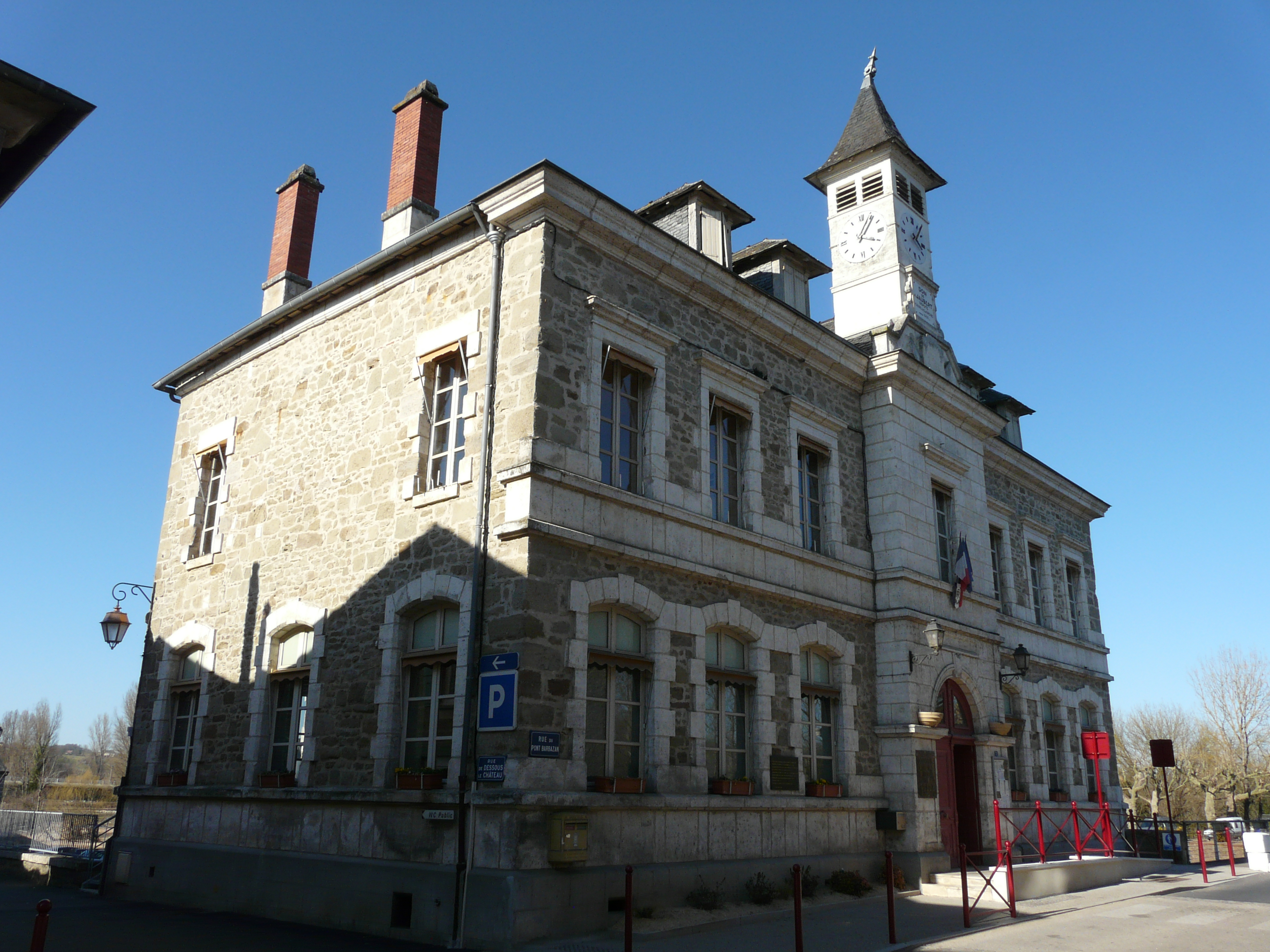 La mairie de Larche, Corrèze, France.